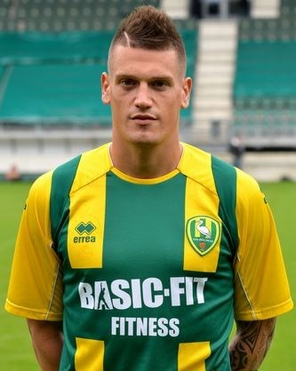 Vito Wormgoor